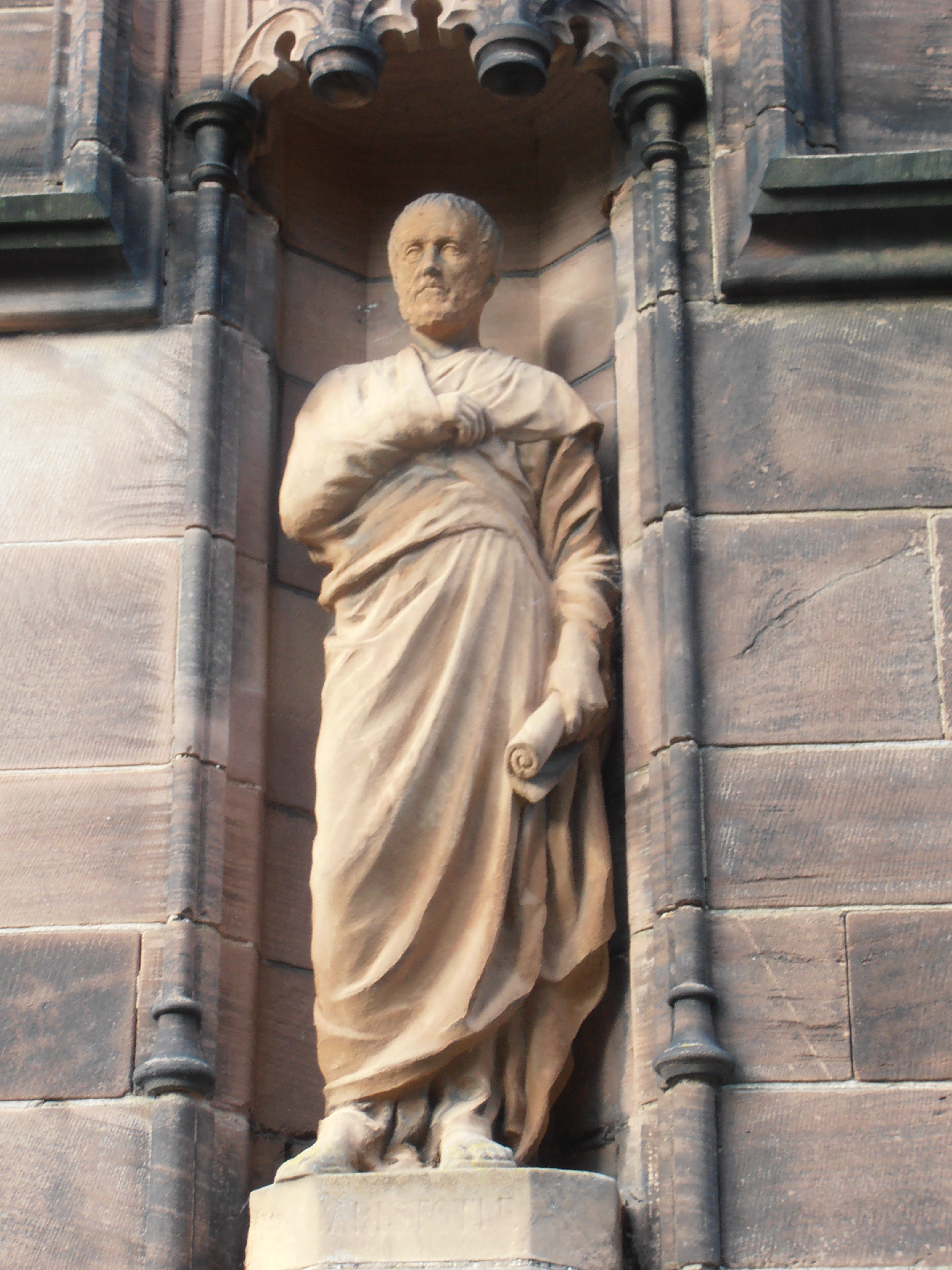 Llyfrgell Sant Deiniol / Llyfgell Gladstone, Penarlâg, Sir y Fflint.